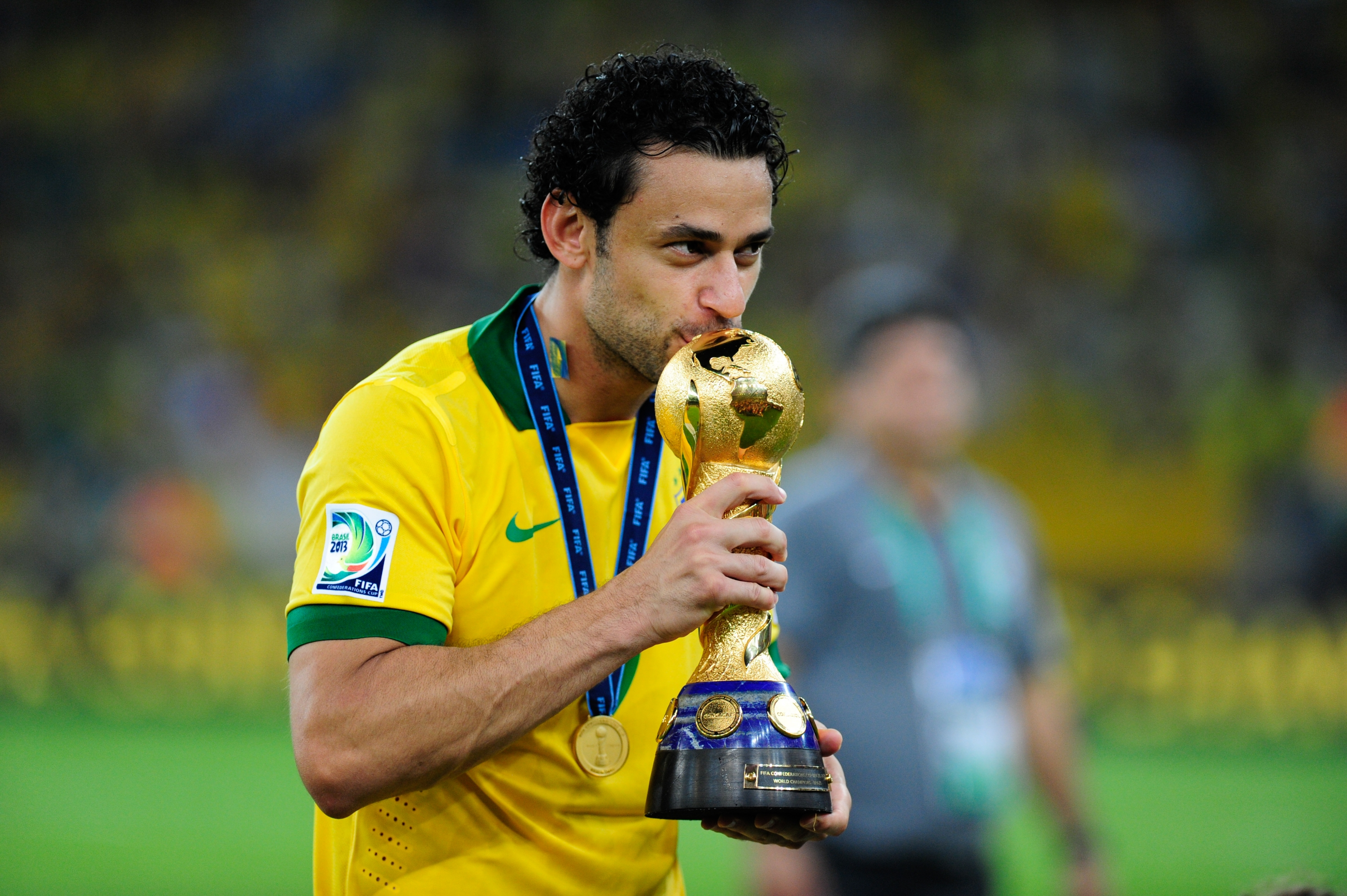 No Estádio do Maracanã, Brasil e Espanha disputam a taça da Copa das Confederações de 2013.